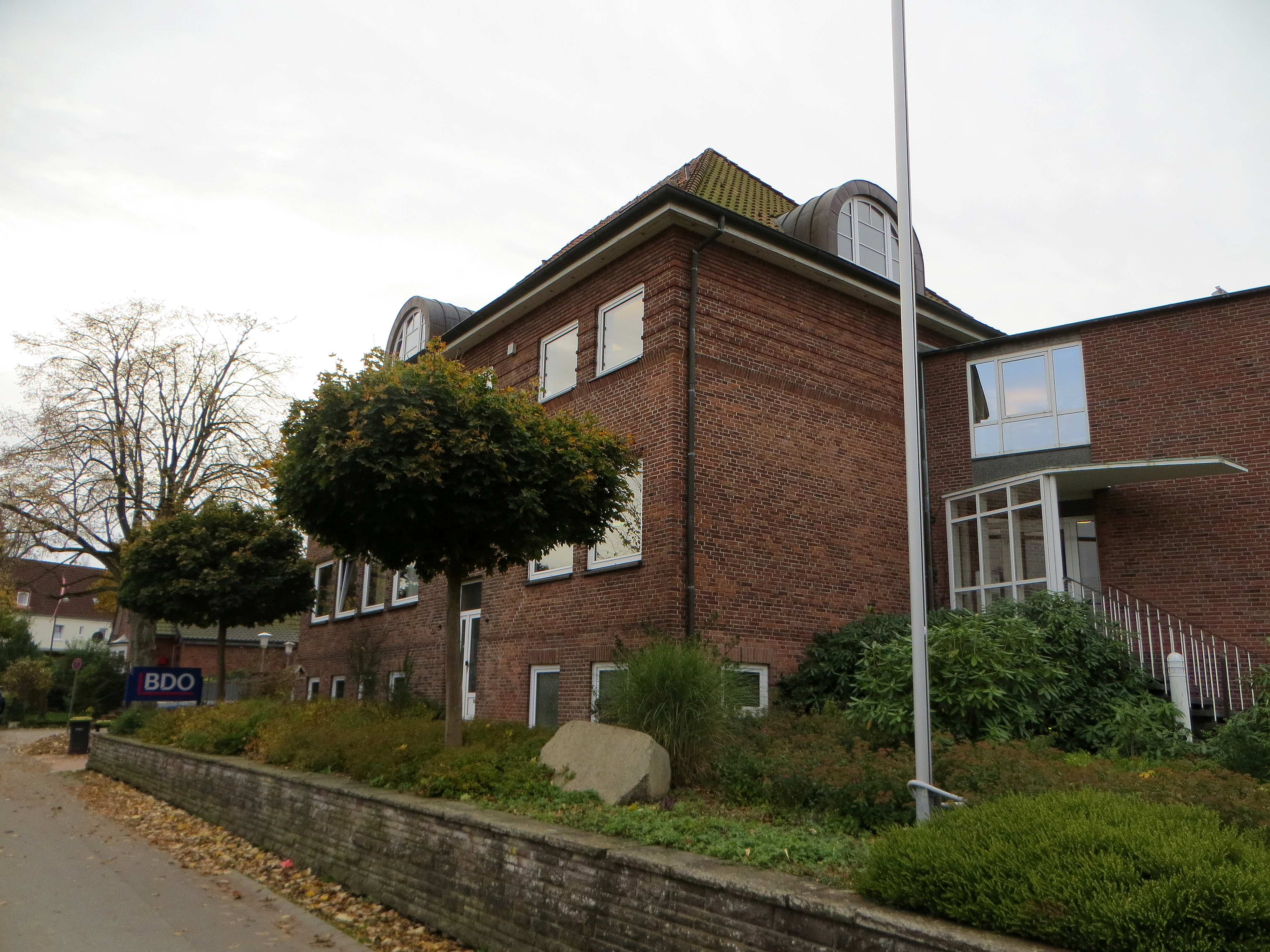 Das ehemalige Sendegebäude an der Straße Am Sender in Flensburg, nun BDO AG Wirtschaftsprüfungsgesellschaft, Bild 2